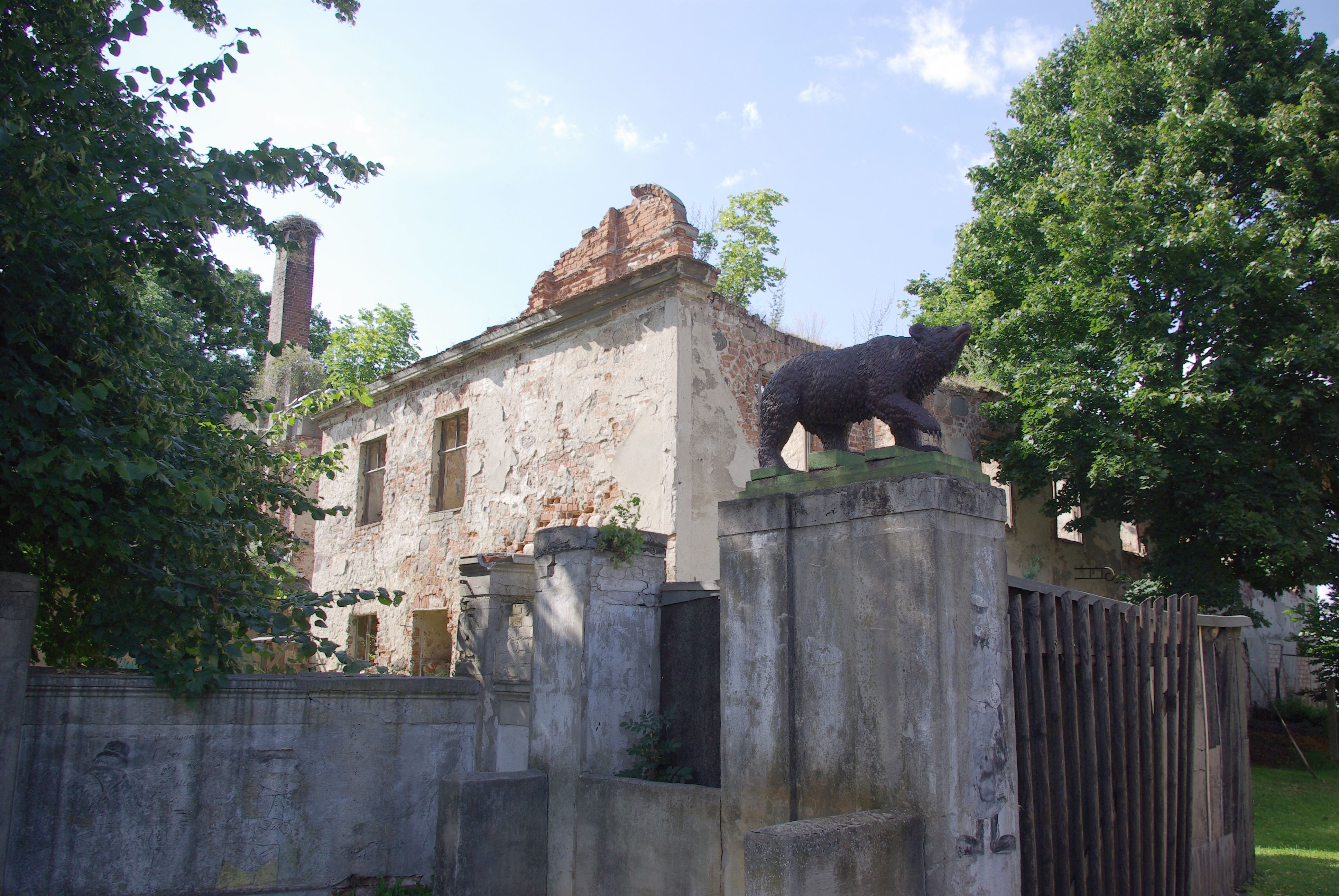 Großbeeren Ortsteil Kleinbeeren. Das Gutshaus aus der Zeit um 1600. Das Gutshaus ist nur noch als Ruine erhalten und steht unter denkmalschutz.